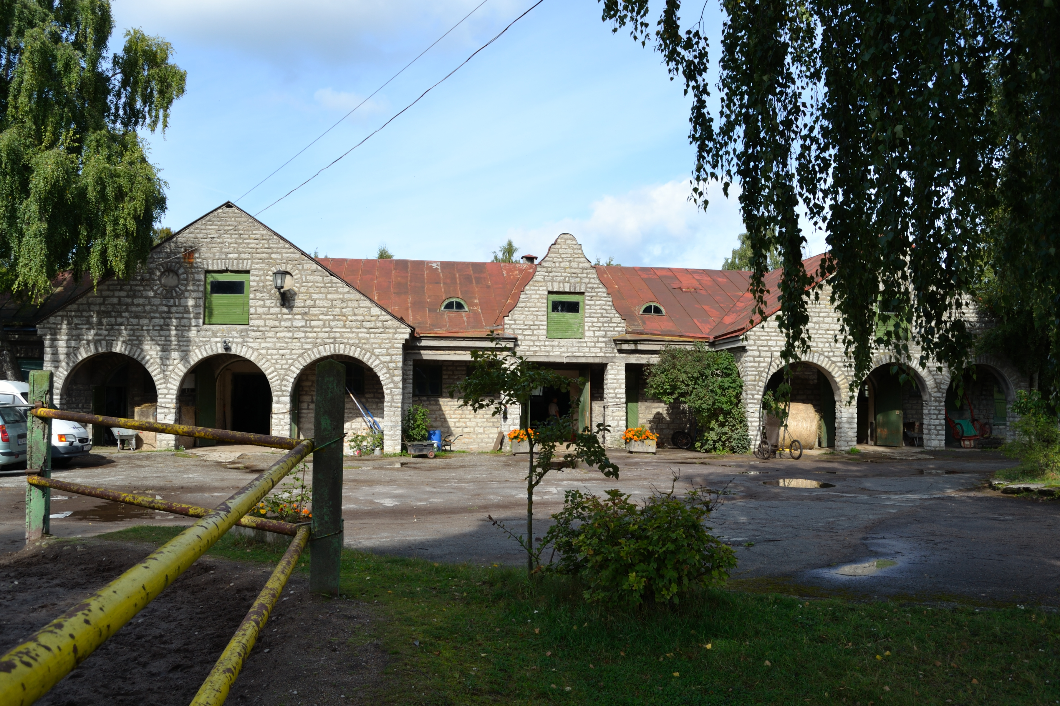 Tallinna hipodroomi vana tallihoone